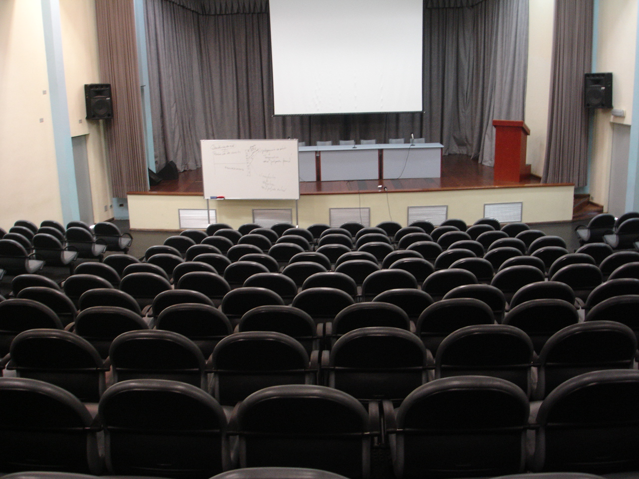 Anfiteatro da Faculdade de Direito de São Bernardo do Campo